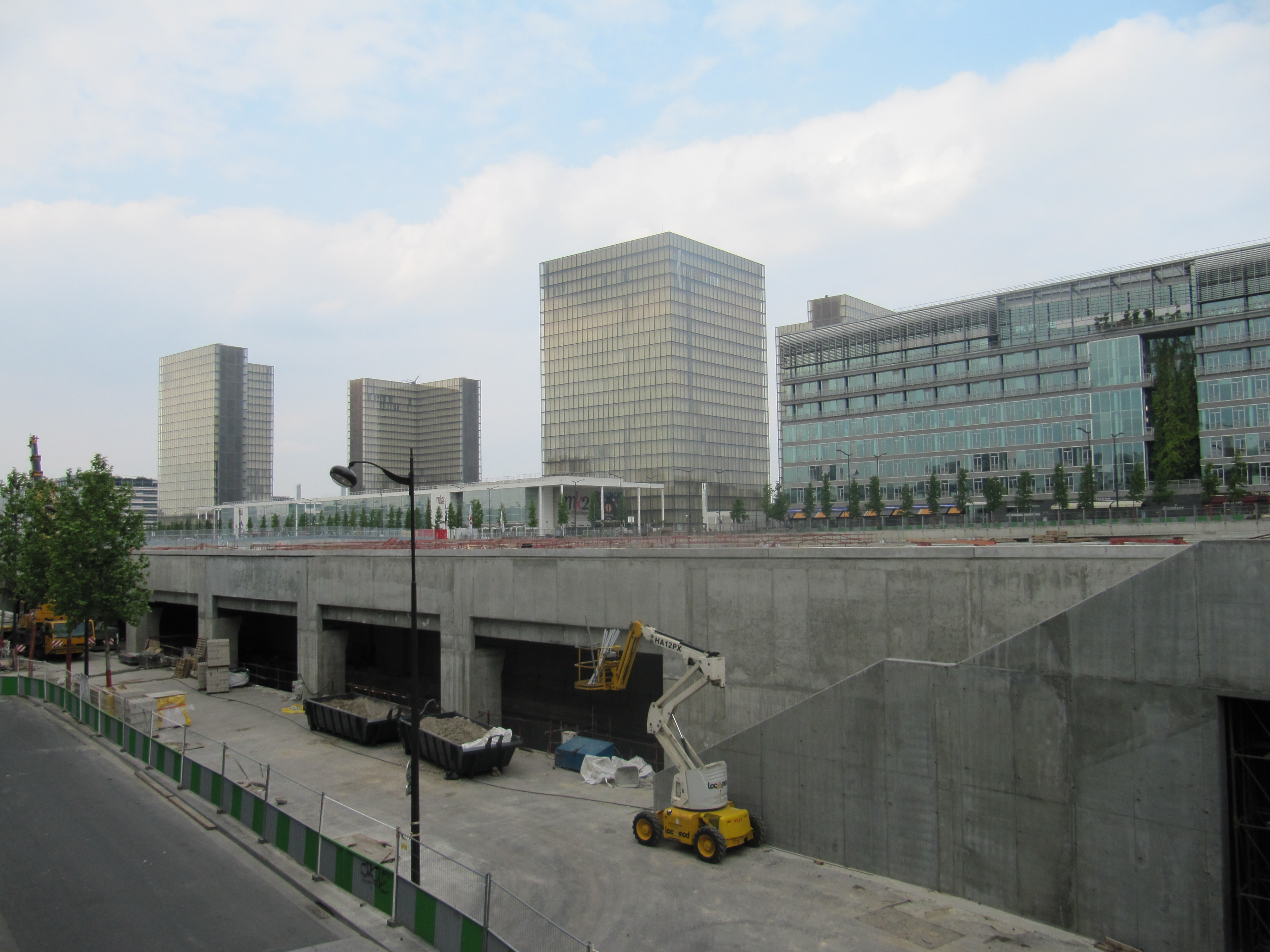 Le Quartier de Paris Rives Gauche, avec ses voies recouvertes